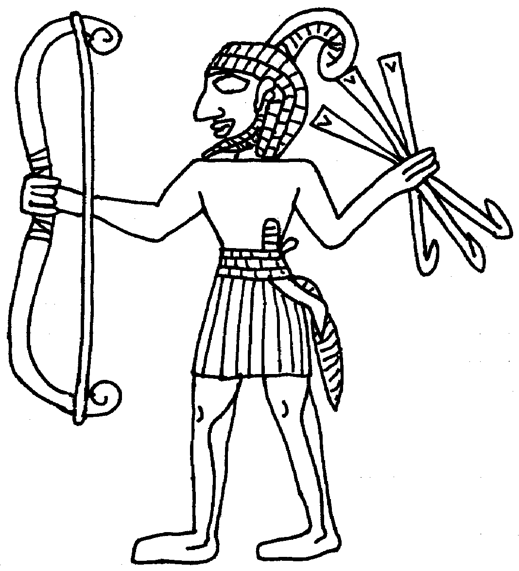 Detail from the "hunter´s palette" (around 3.400 BC.)